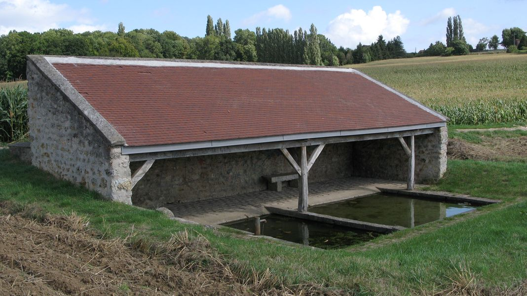 Le lavoir de la Côte Duché à Lainville-en-Vexin (78, commune du Parc Naturel Régional du Vexin Français) après rénovation.